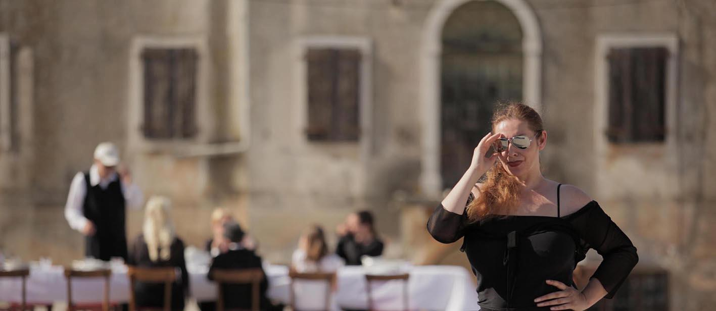 Katja